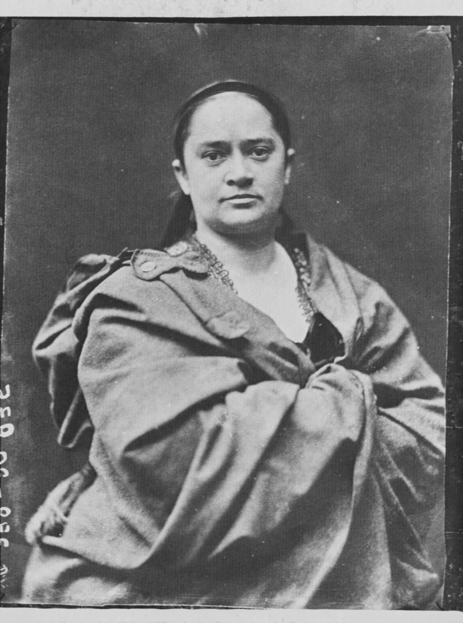 Tournachon, Gaspard-Félix: Friederike O'Connell (1823-1885)